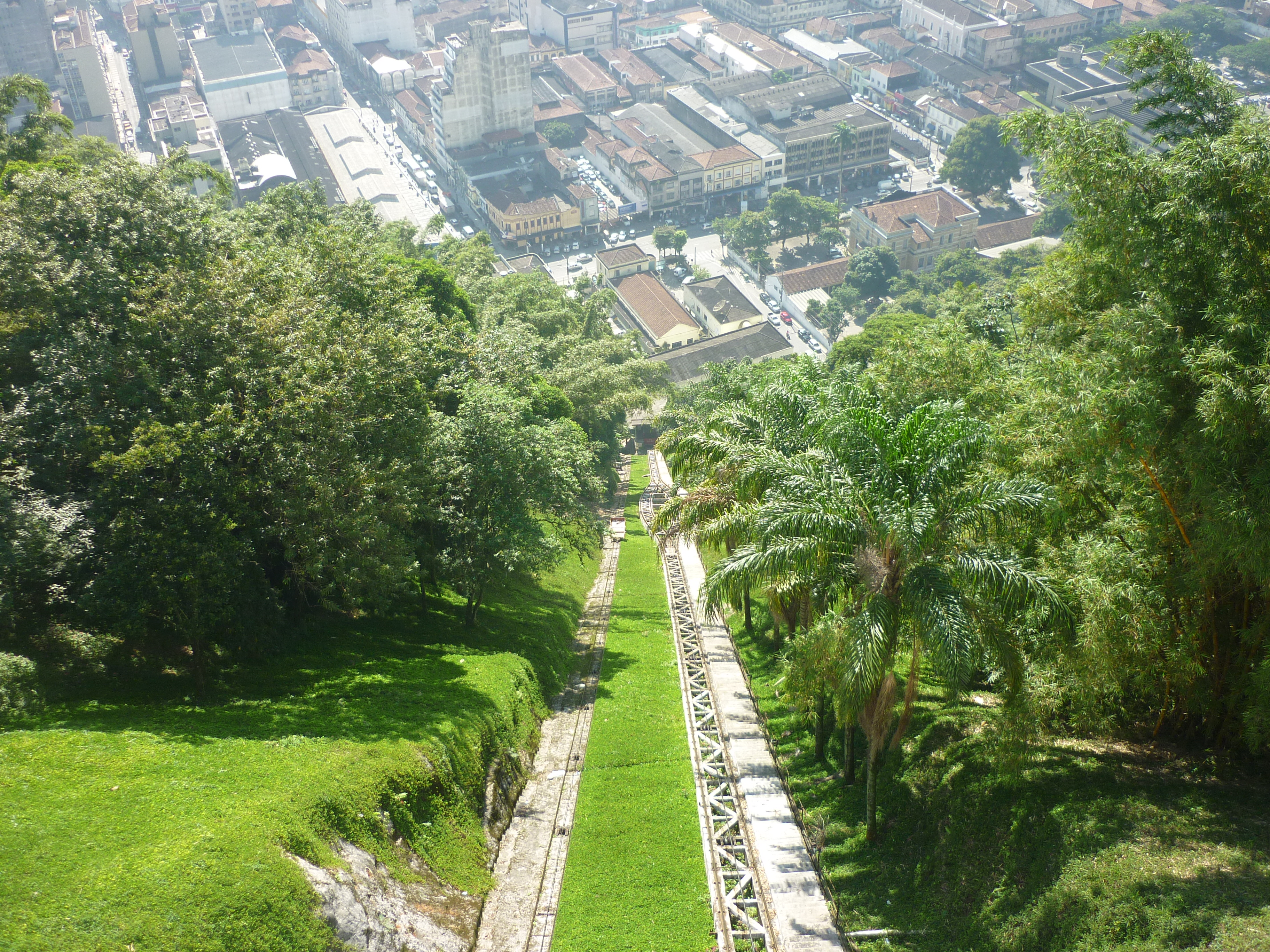 Santos Brasil